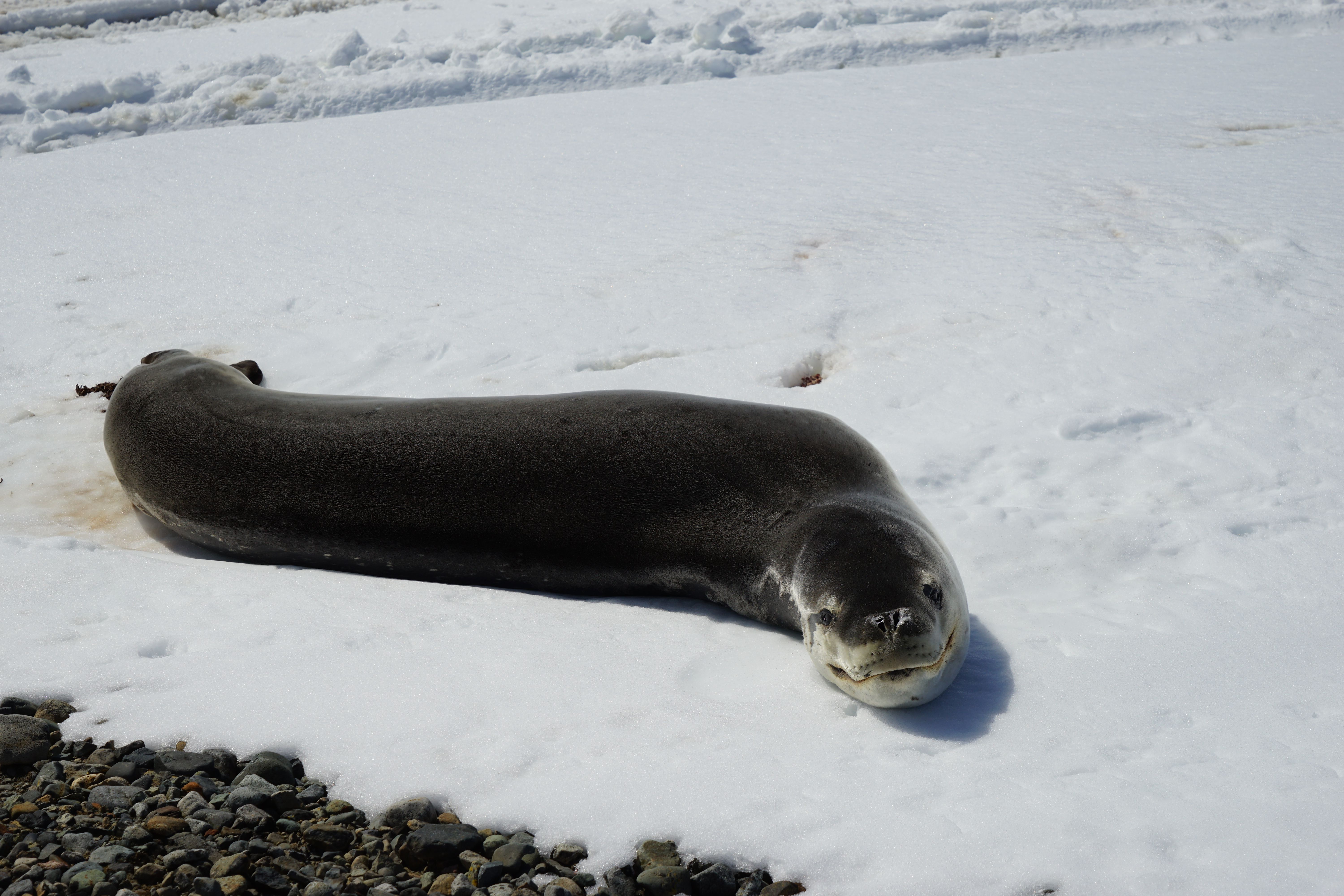 남극 킹조지섬에 위치한 세종과학기지 인근에서 2015년 12월 28일 촬영된 Hydrurga leptonyx (얼룩무늬물범) 사진